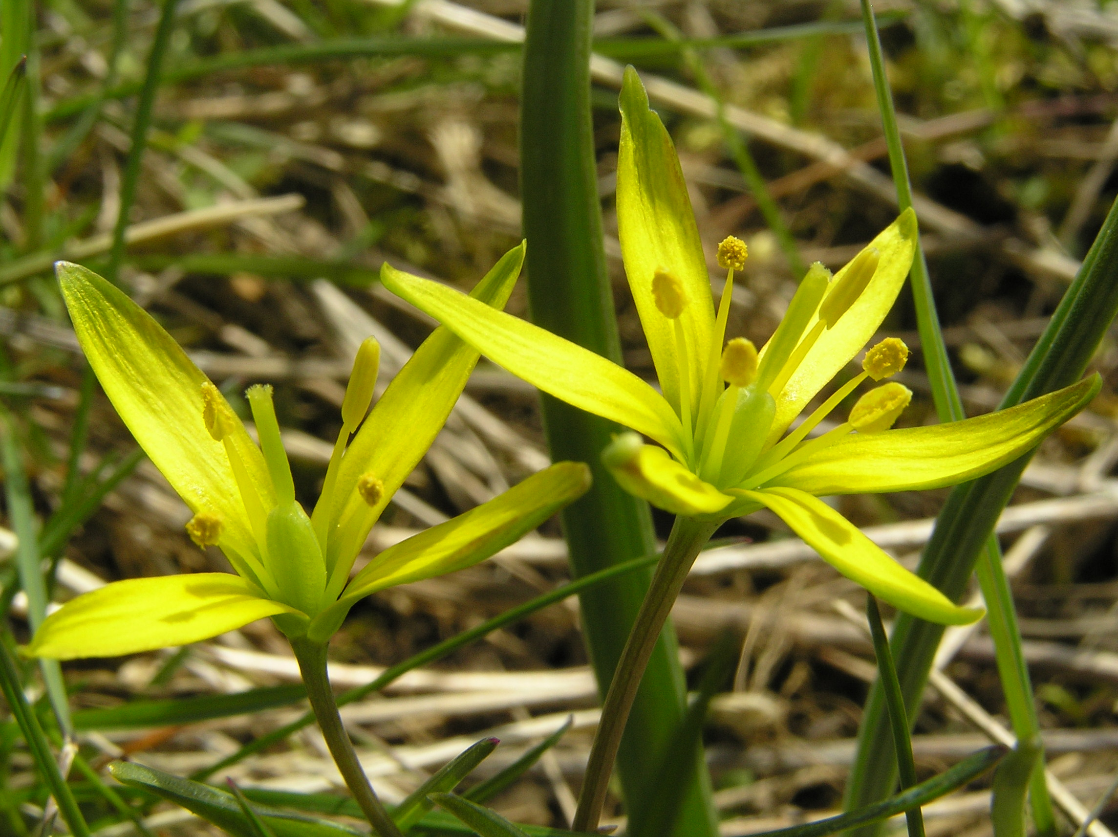 Gagea pratensis, aufgenommen im Gartetal auf Kartenblatt (MTB) 4525